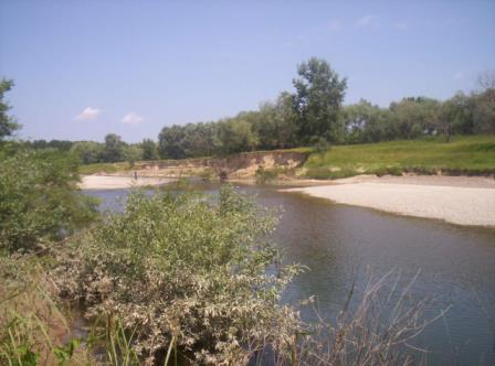 Siret near Bucecea